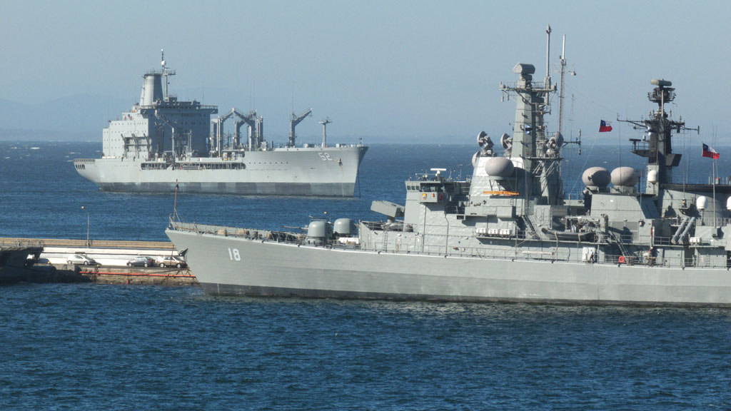 Tanker „Almirante Montt“ (AO-52) und Fregatte „Almirante Riveros“ (FFG-18) der chilenischen Marine